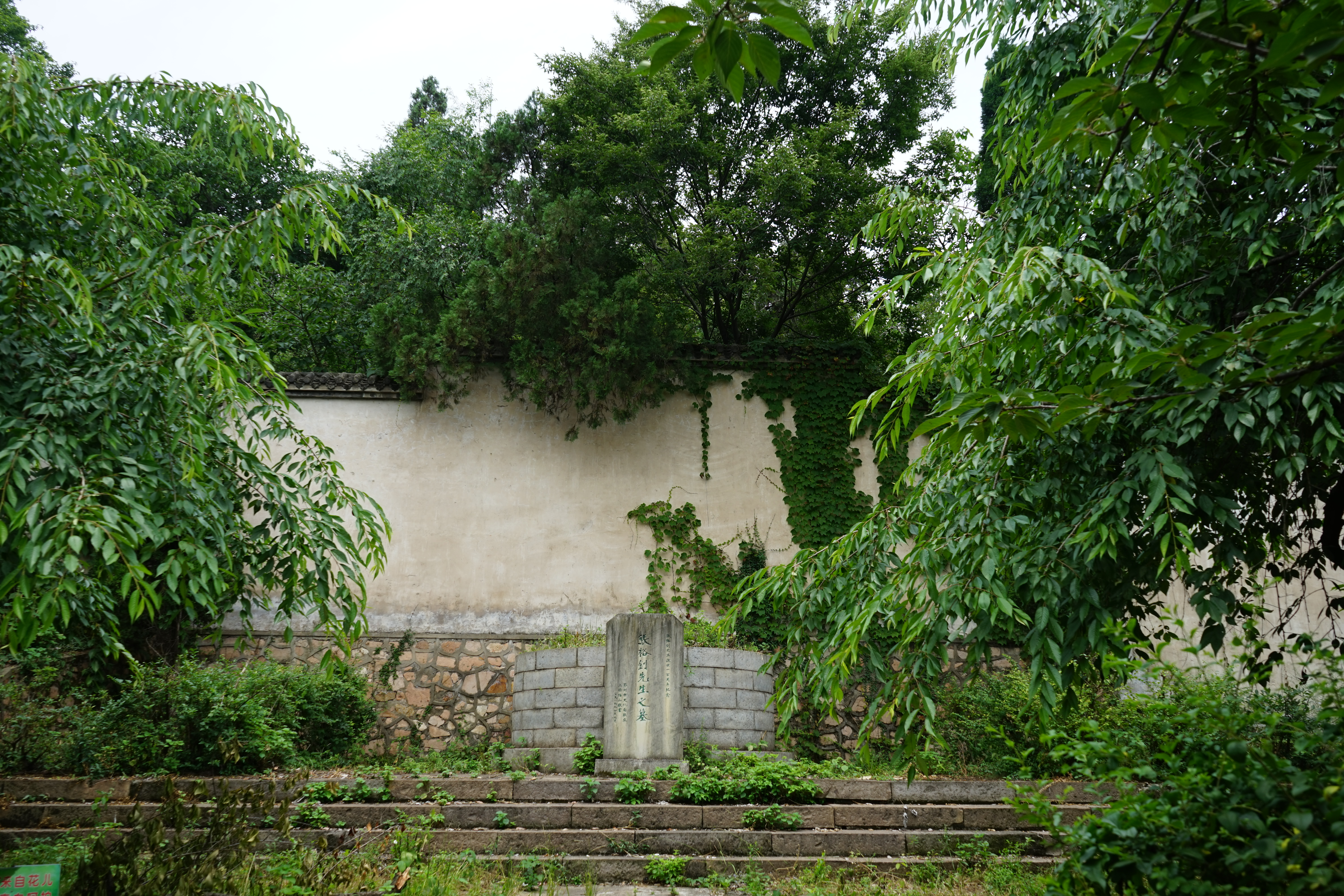 中文（中国大陆）: 张裕钊墓。位于张裕钊陵园最后。